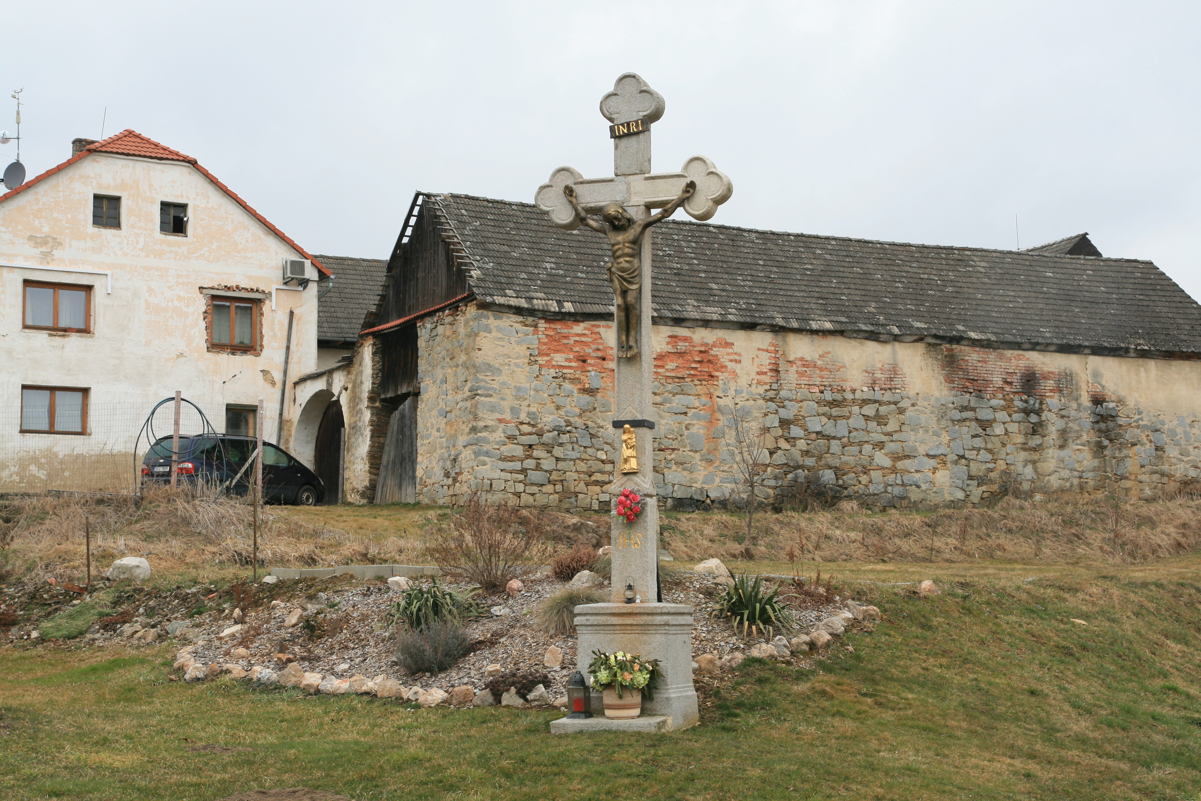 Vesnice Suchdol, část obce Bujanov v okrese Český Krumlov. Kříž na návsi, v pozadí dům č. 19.